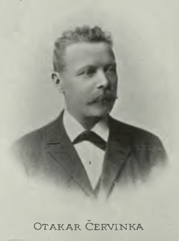 Portrét – Otakar Červinka (1846-1915), Český básník.